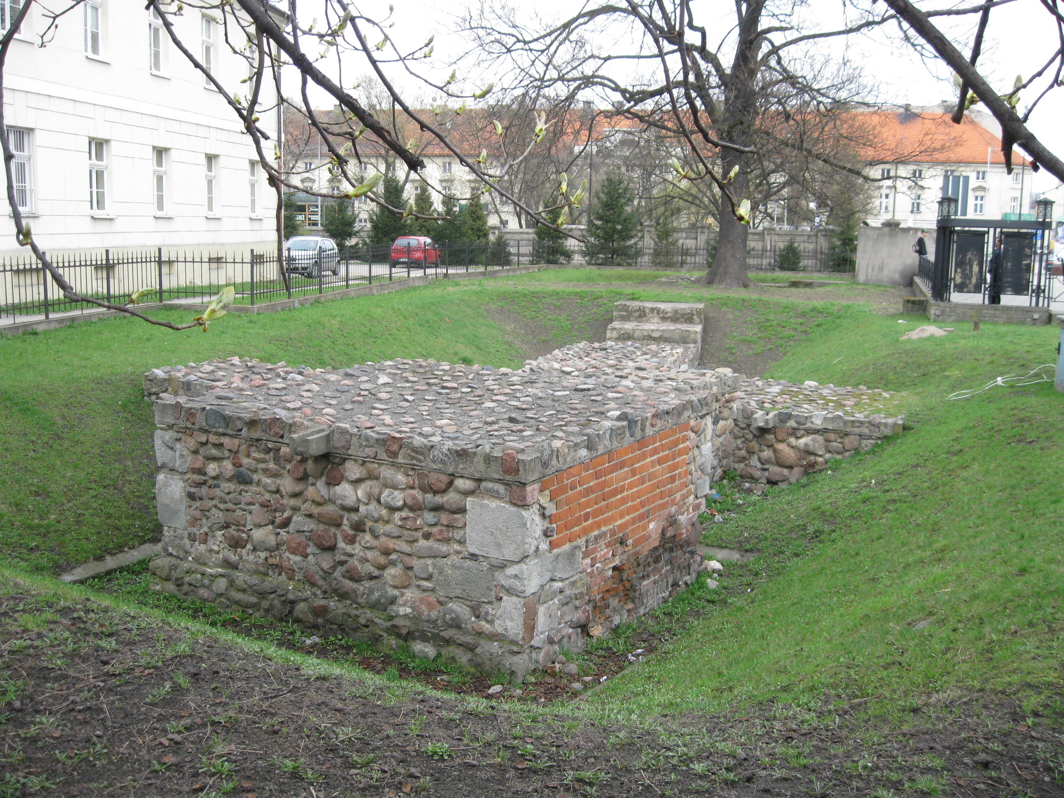 Kalisz, zespół murów miejskich.